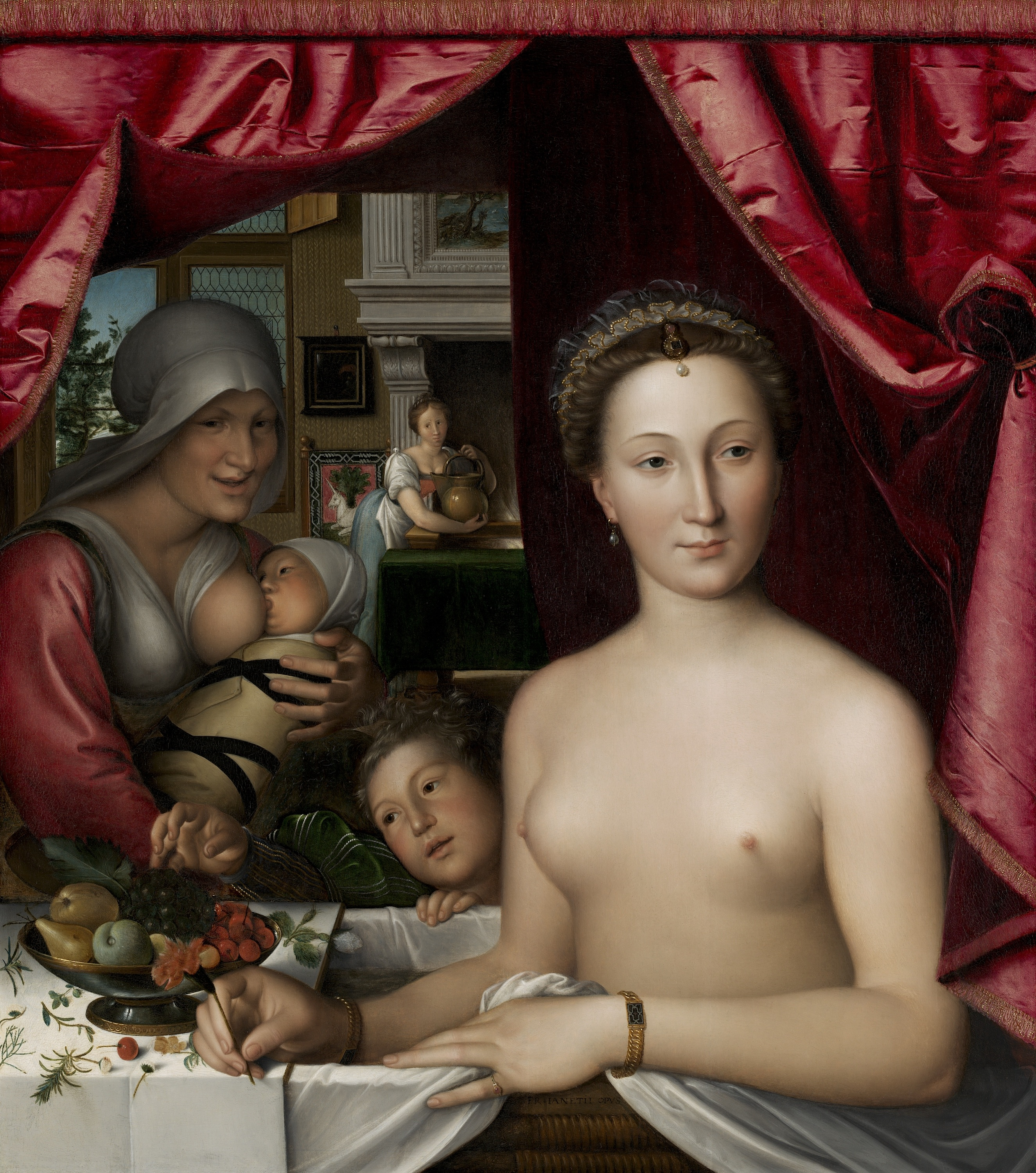 Identifikation der Dargestellten ist umstritten